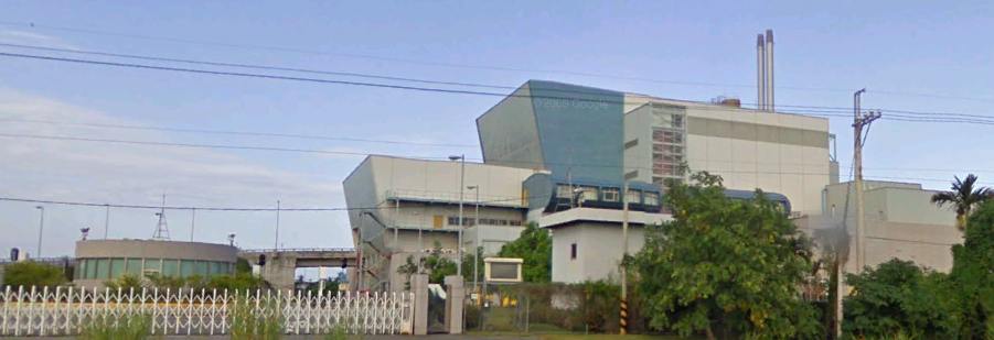 台東垃圾焚化廠。